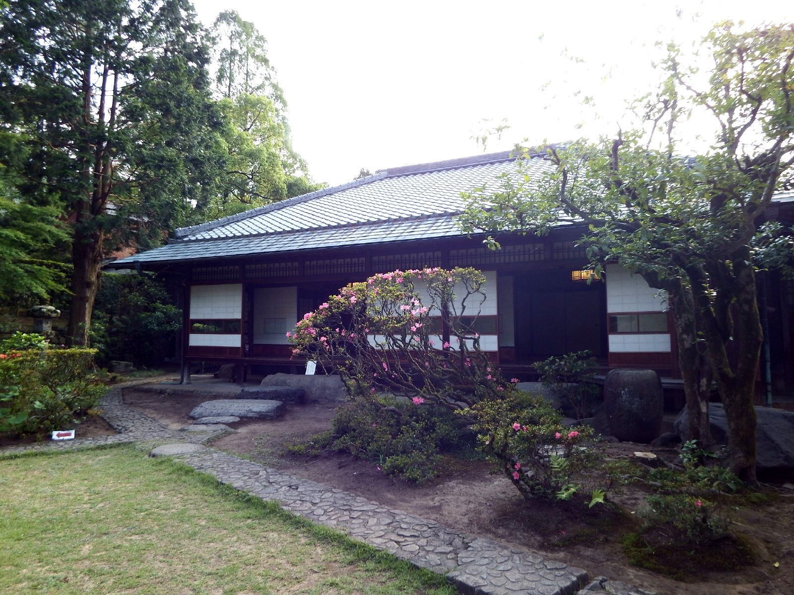 旧広瀬邸の新座敷